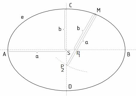 Proužková kostrukce elipsy - rozdílová